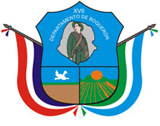 Escudo del departamento de Boquerón, Paraguay